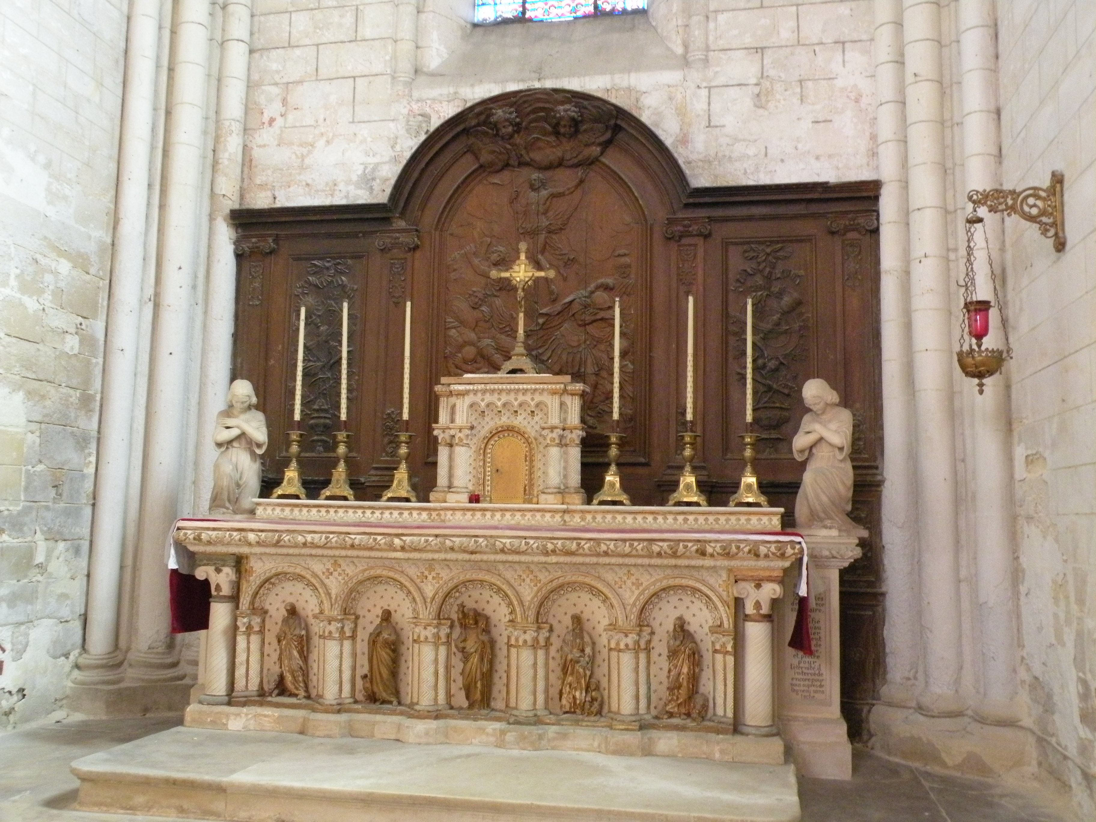 Église de la Nativité-de-Notre-Dame de Lavilletertre